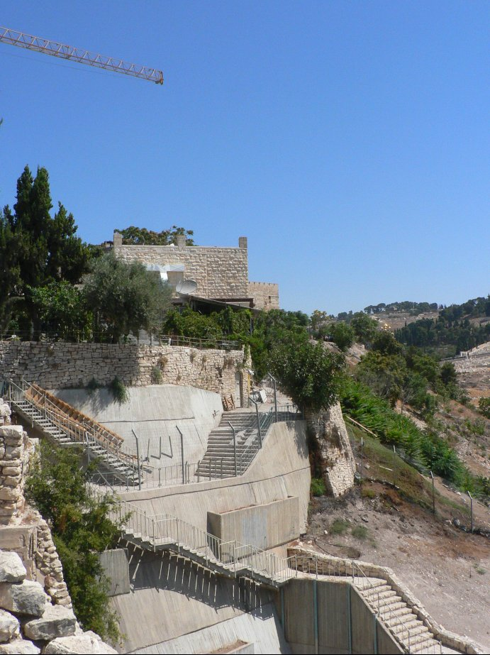 עיר דוד